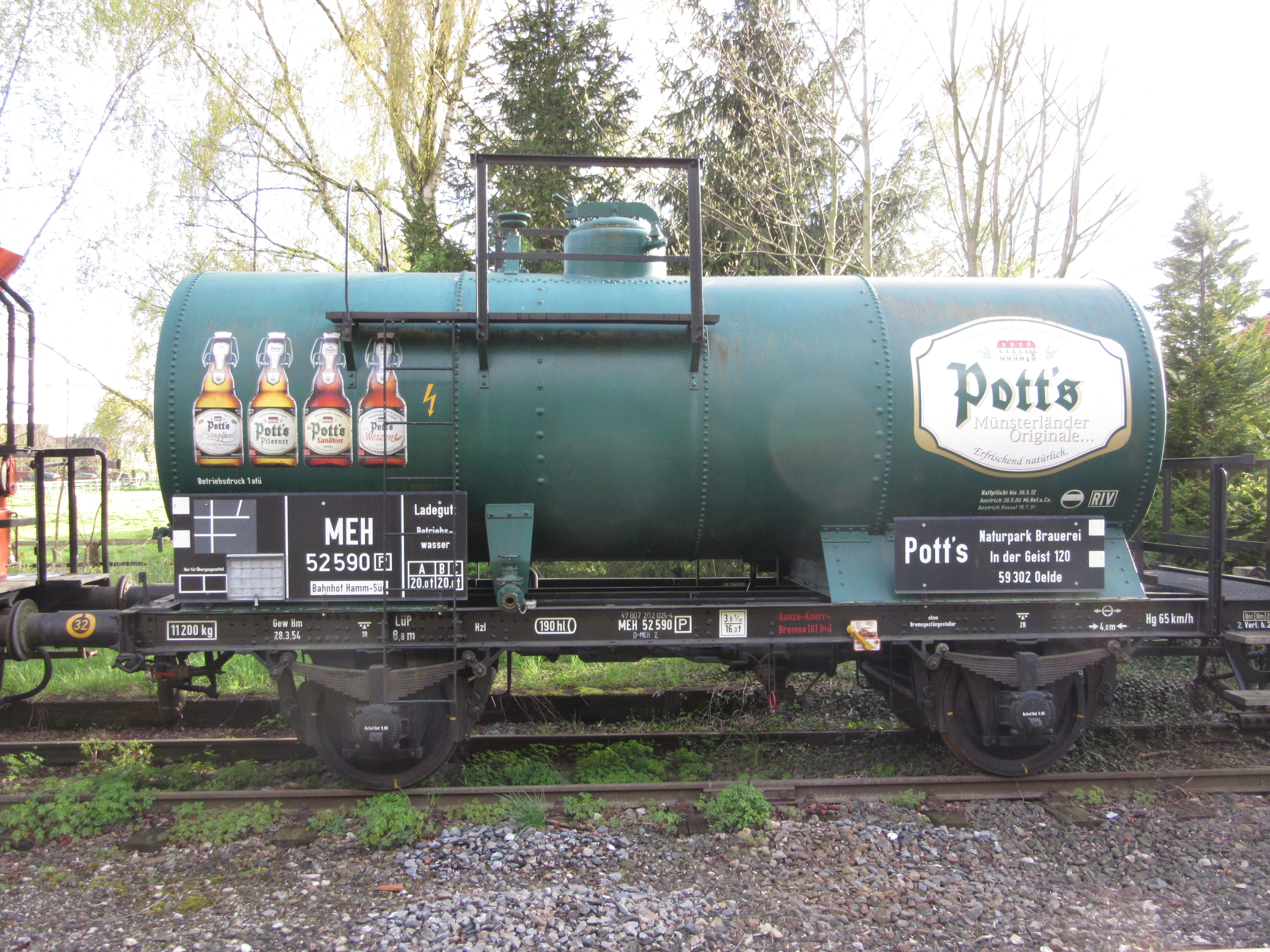 Kesselwagen der Firma Potts in Oelde